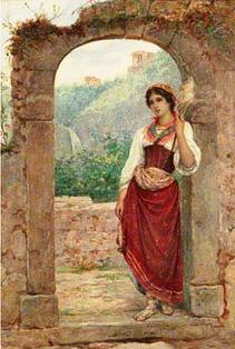 Ragazza sullo sfondo di Tivoli, acquarello su carta, 53 x 36 cm, coll. privata